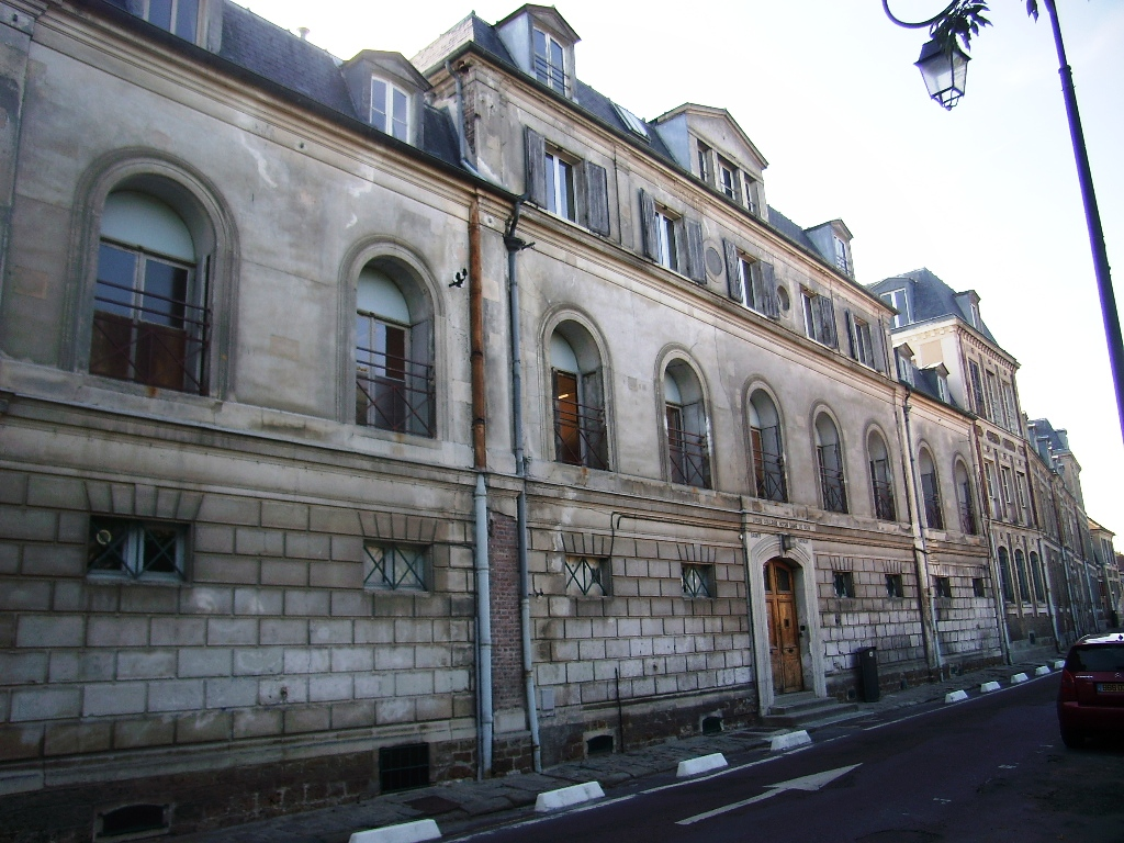 Collège et lycée Notre-Dame de Sion à Évry (Essonne)